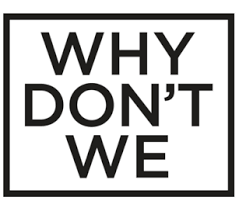 Logo Why Don't We